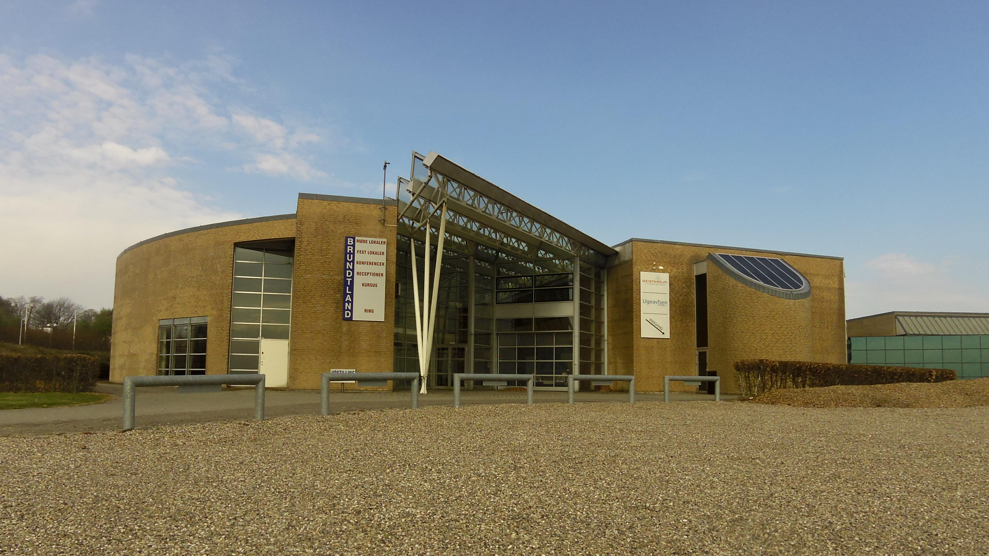 Brundtlandcenteret